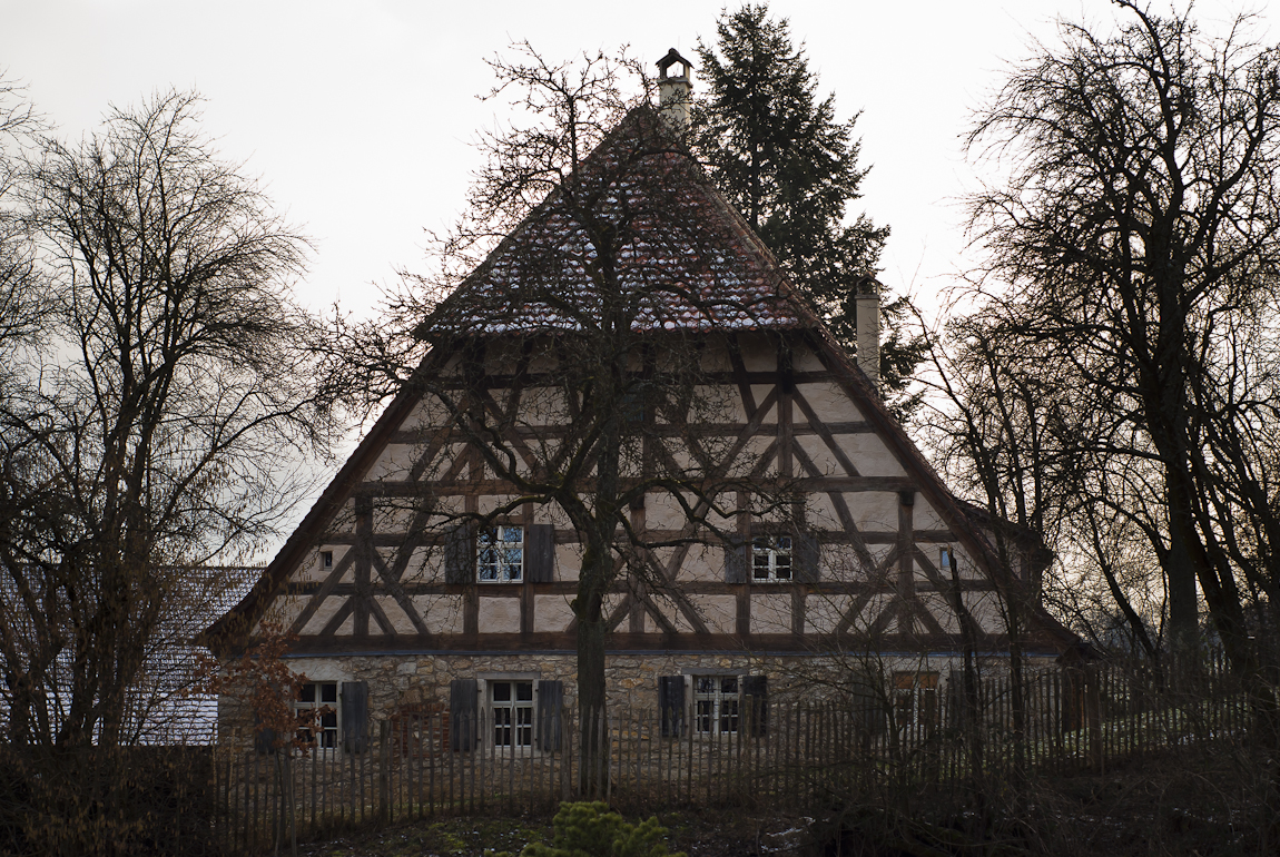 Ehemaliges Wohnstallhaus in Peuerling, eingeschossiger Kalksteinbau mit Fachwerkgiebel, Halbwalmdach, im Kern 17. Jahrhundert This is a photograph of an architectural monument.